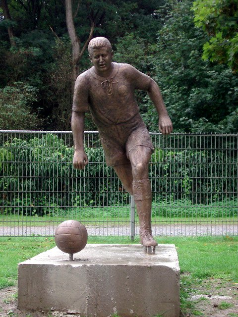 Helmut-Rahn-Denkmal in Essen